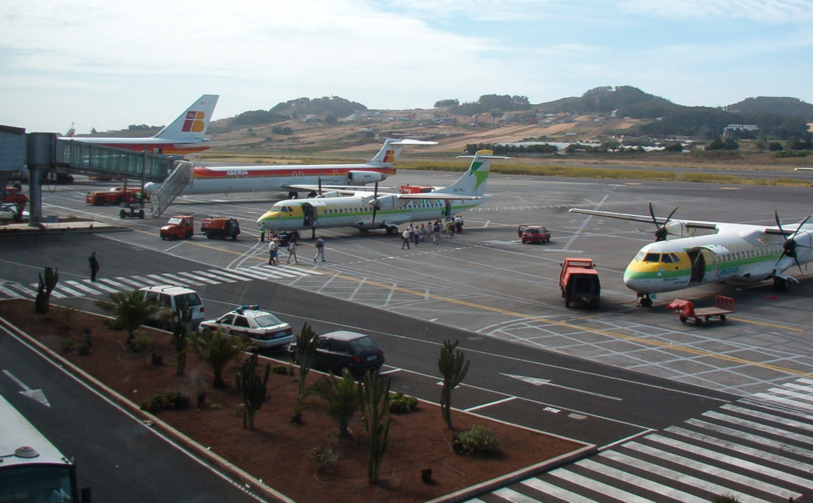 Aeropuerto de Tenerife Norte Plataforma de estacionamiento del Aeropuerto Internacional de Tenerife Norte.